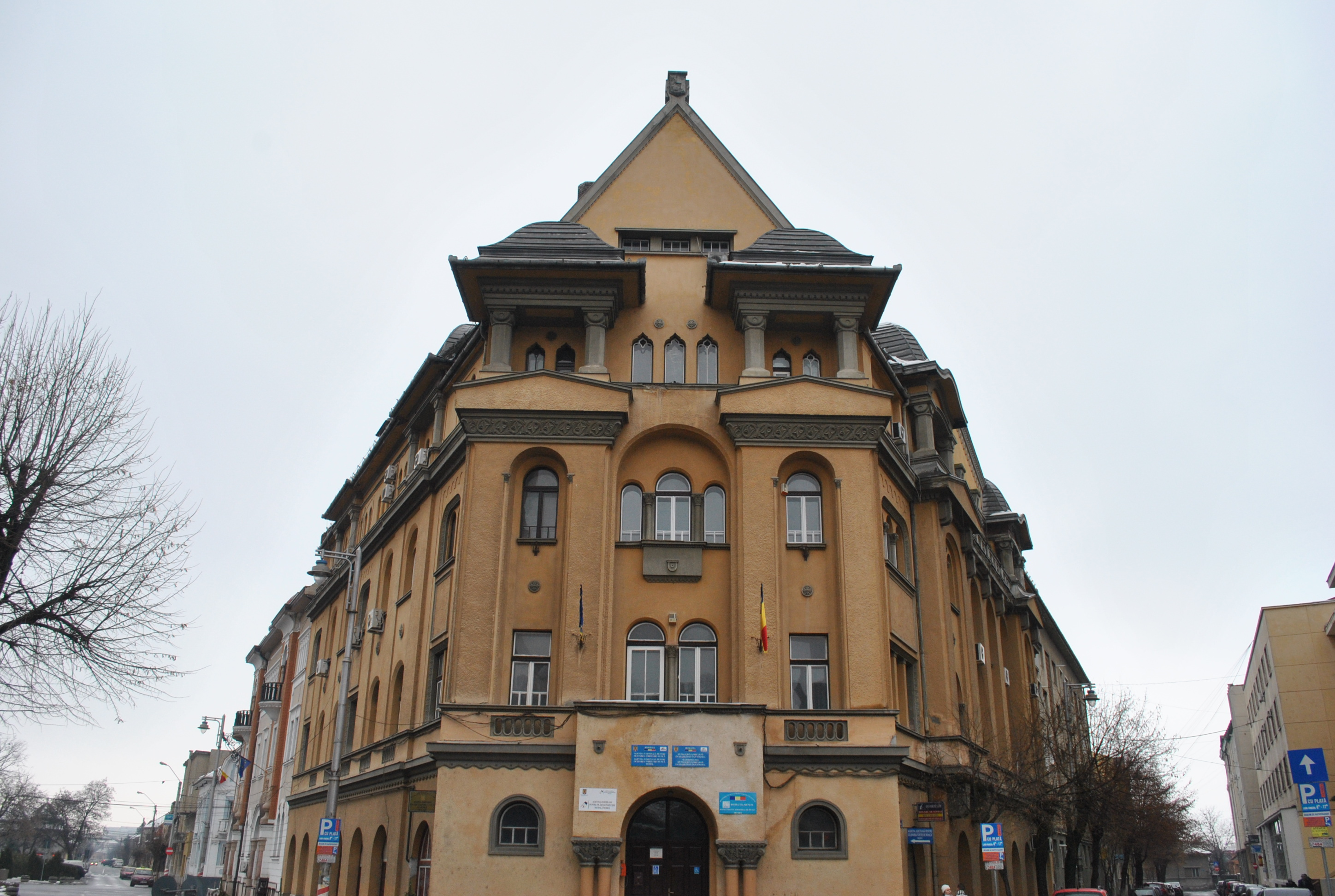 Ansamblul urban Zona centrală - centrul comercial